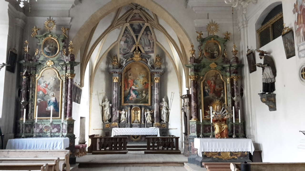 Chiesa dell'ospedale a Villabassa